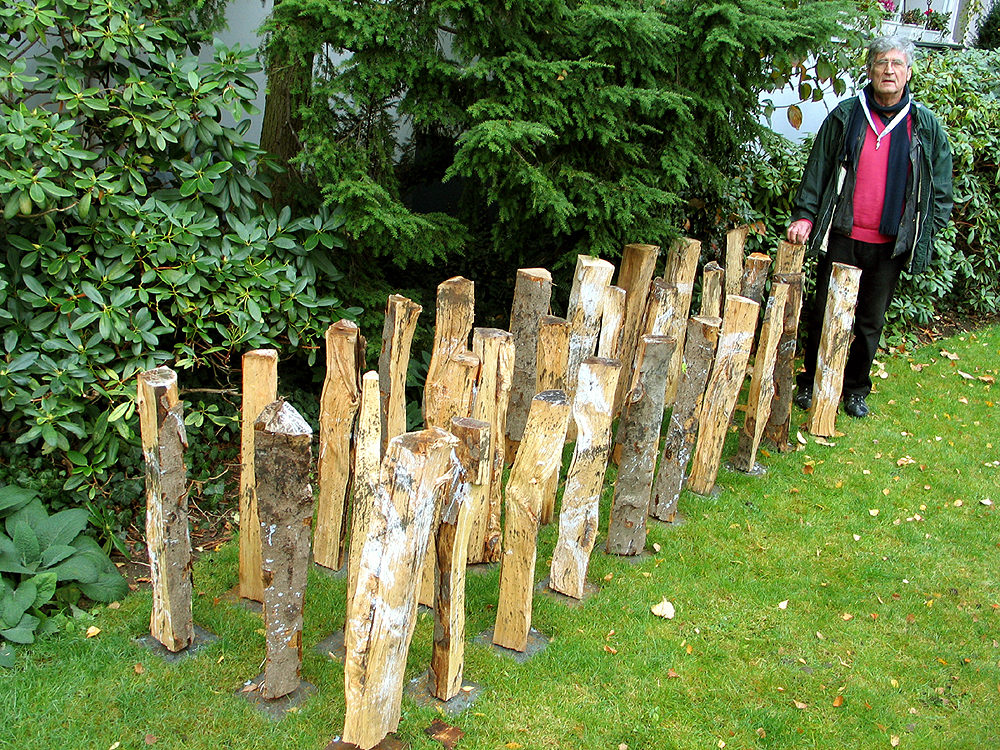 Die Installation Regenwald des Künstlers János Nádasdy auf der Ausstellung Wintergärten V - H2O in der Güntherstraße in Hannover ...